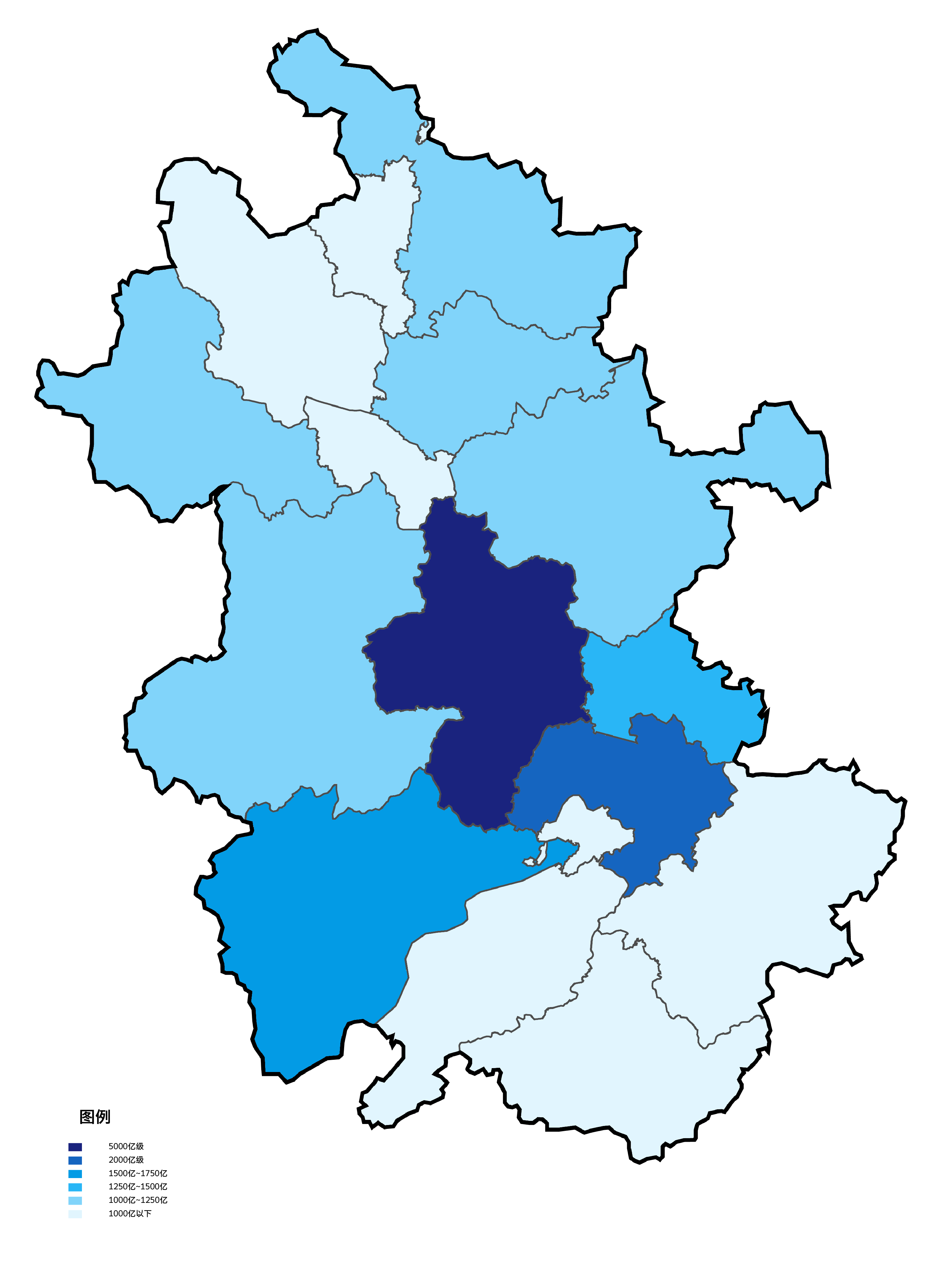 中文（中国大陆）: 安徽省各地级市根据2014年地区生产总值填色地图